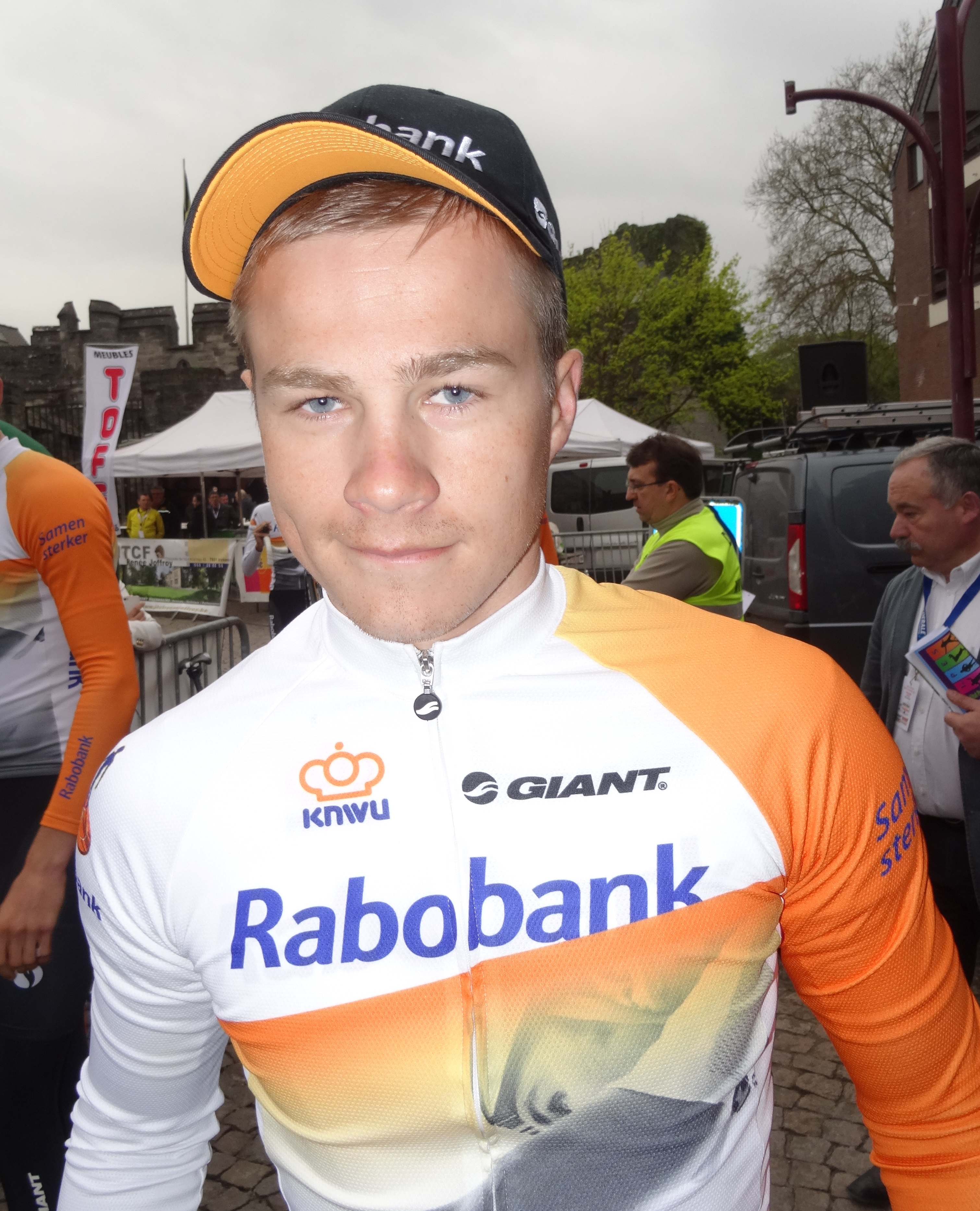 Triptyque des Monts et Châteaux 2014, étape 1, 4 avril 2014, départ d'Antoing. Depicted person: André Looij Depicted team: Rabobank Development The creation of these files was made possible thanks to the organizers of the Triptyque des Monts et Châteaux 2014 English | français | +/−